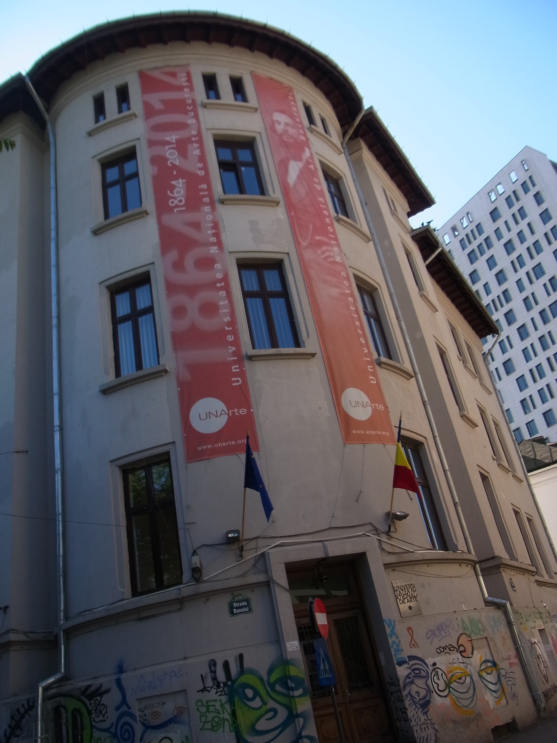 Universitatii Nationale de Arte din Bucuresti.